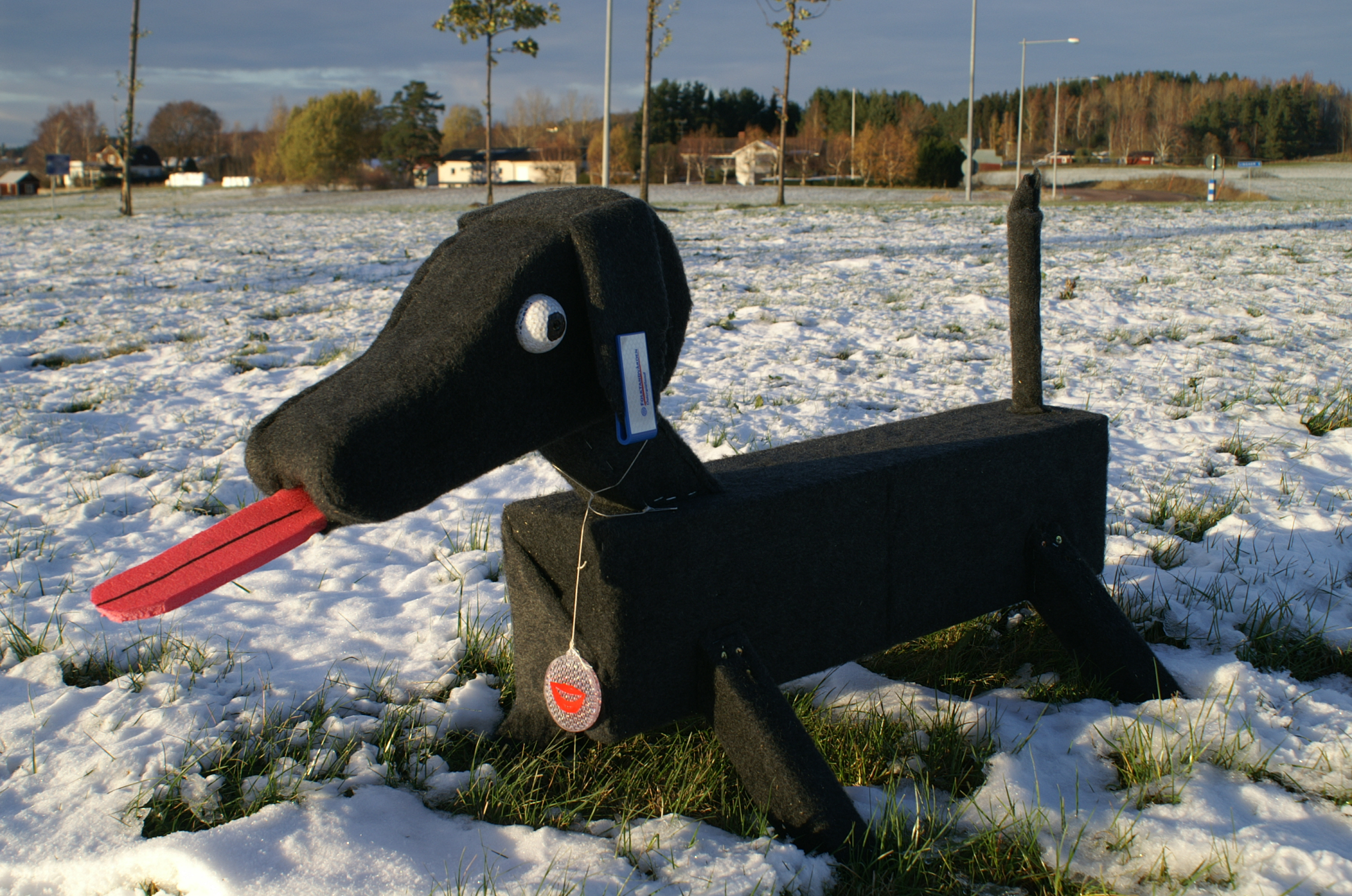 Rondellhund i Vårdsbergs rondell.